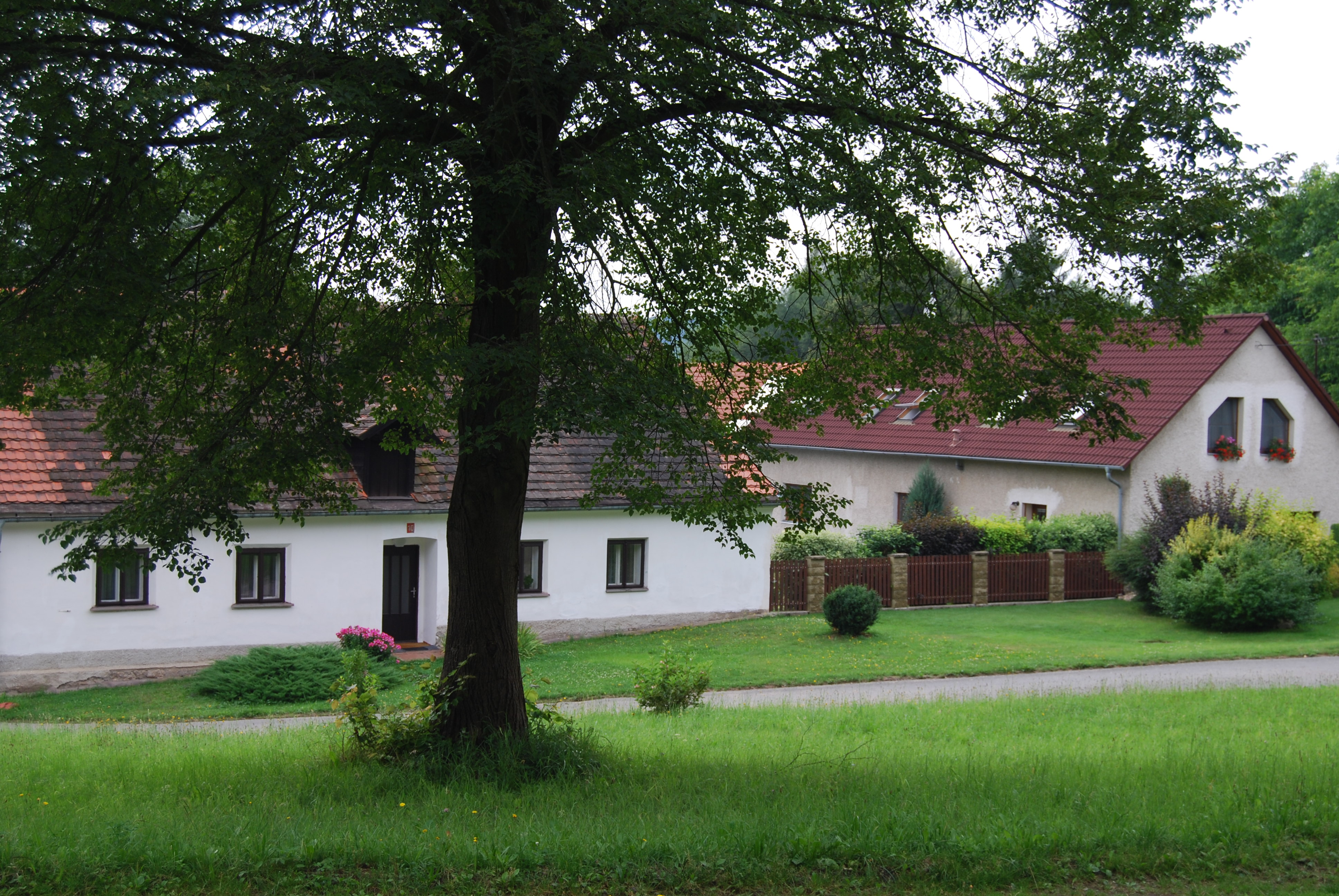 Pohled na část návsi. Durdice - část obce Heřmaničky v okrese Benešov. Česká republika.